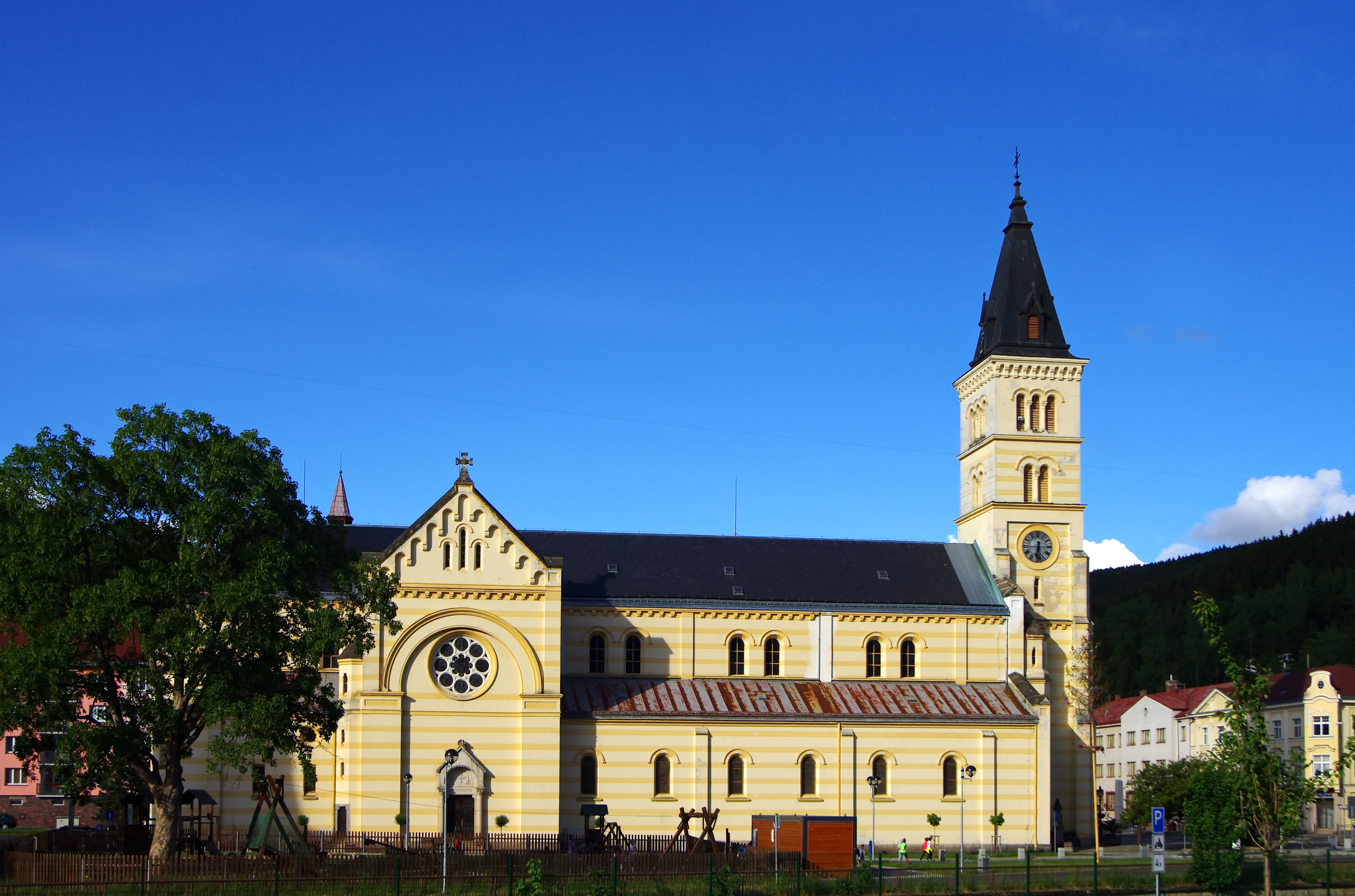 Kostel Nejsvětější svátosti oltářní, Kraslice, Kraslice (okres Sokolov).